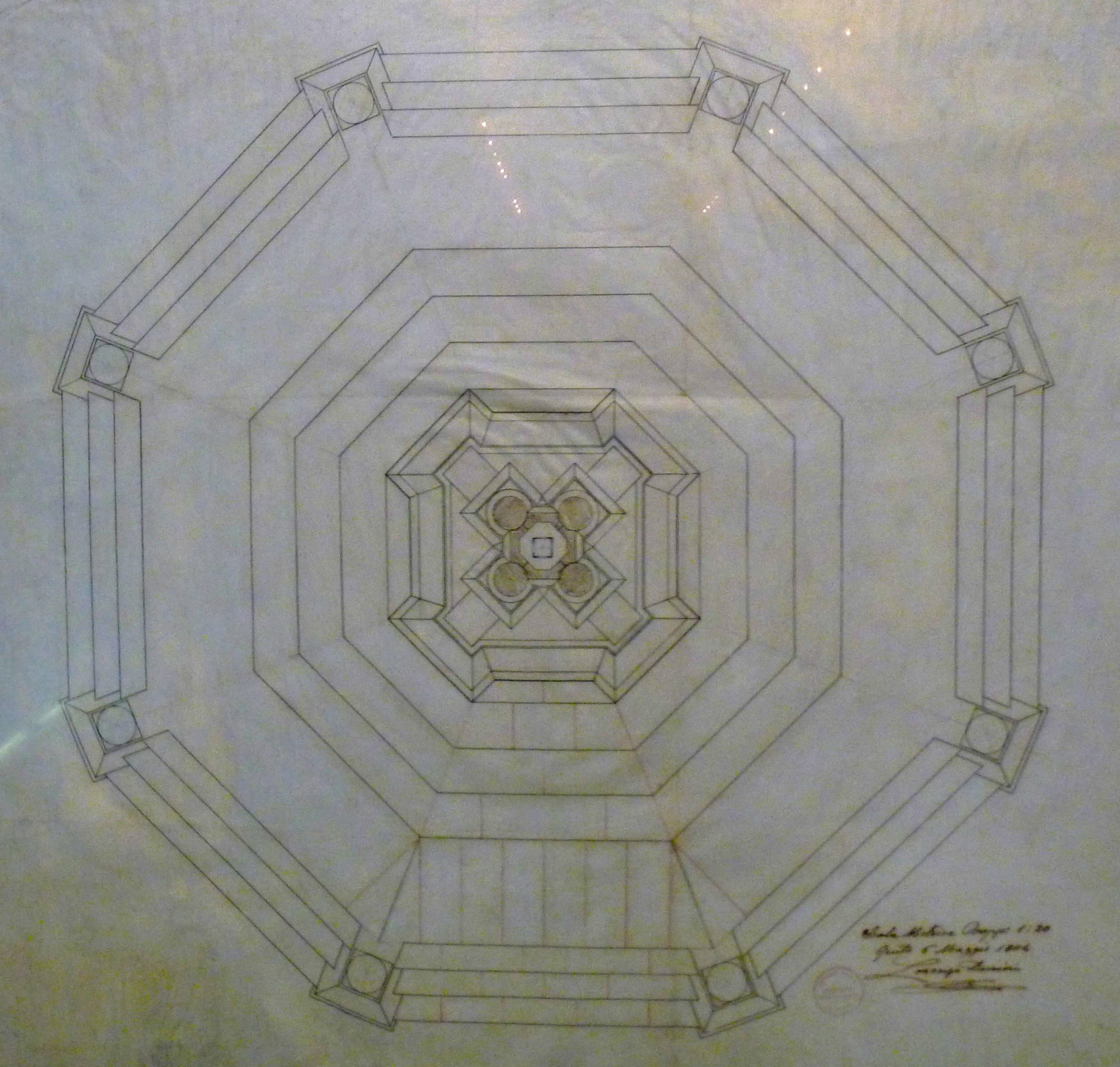 Boceto de la planta del Monumento a los Próceres de la Independencia de 1809, por Lorenzo Durini Vasalli. Quito, 1905. Tinta sobre papel hilo. Colección Museo de la Ciudad.